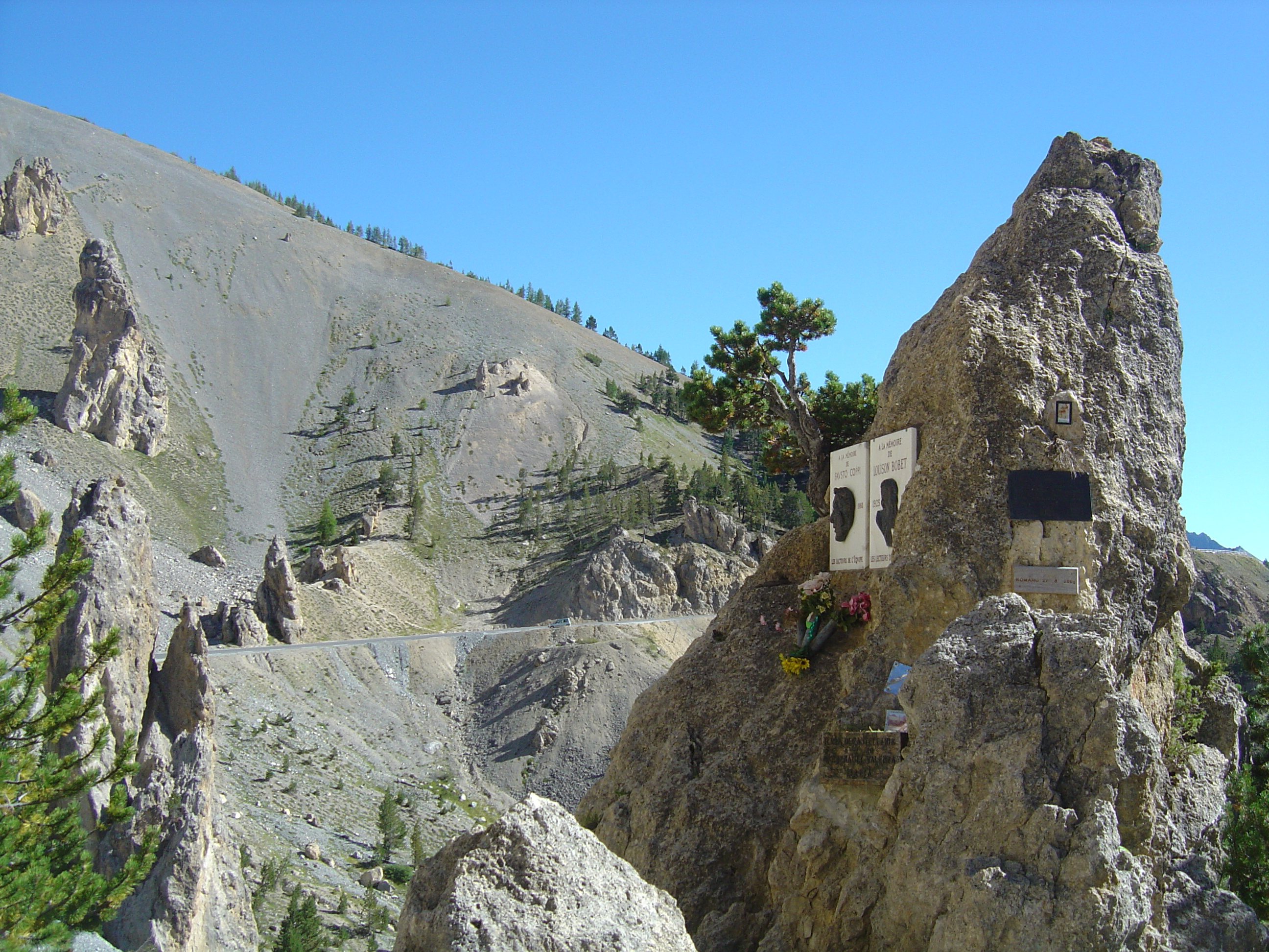 Stèle en l'honneur de Fausto Coppi et Louison Bobet juste après la Casse Désserte sur le versant sud du col d'Izoard